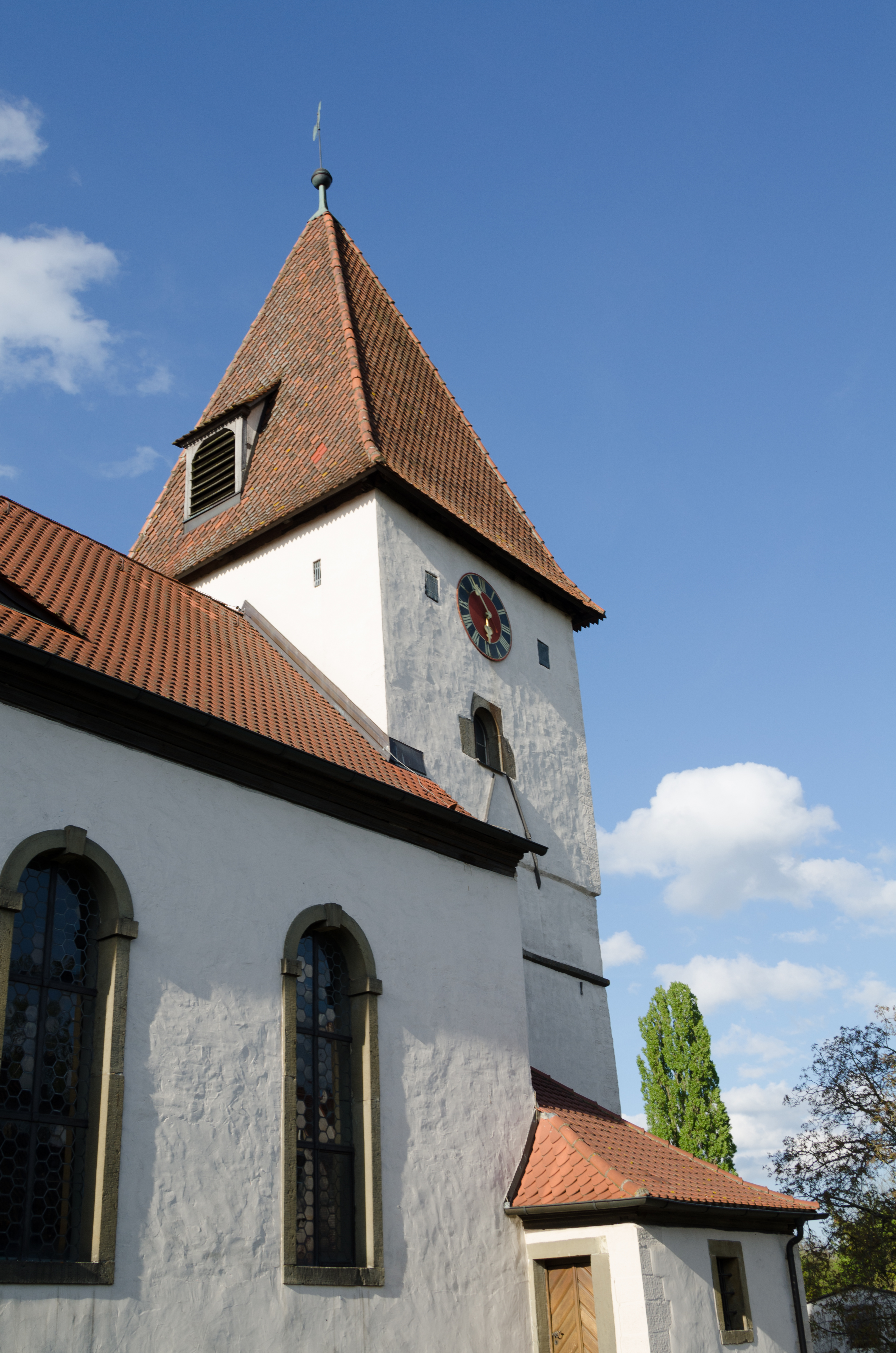 Evangelische Kirche St. Laurentius in Mörlbach